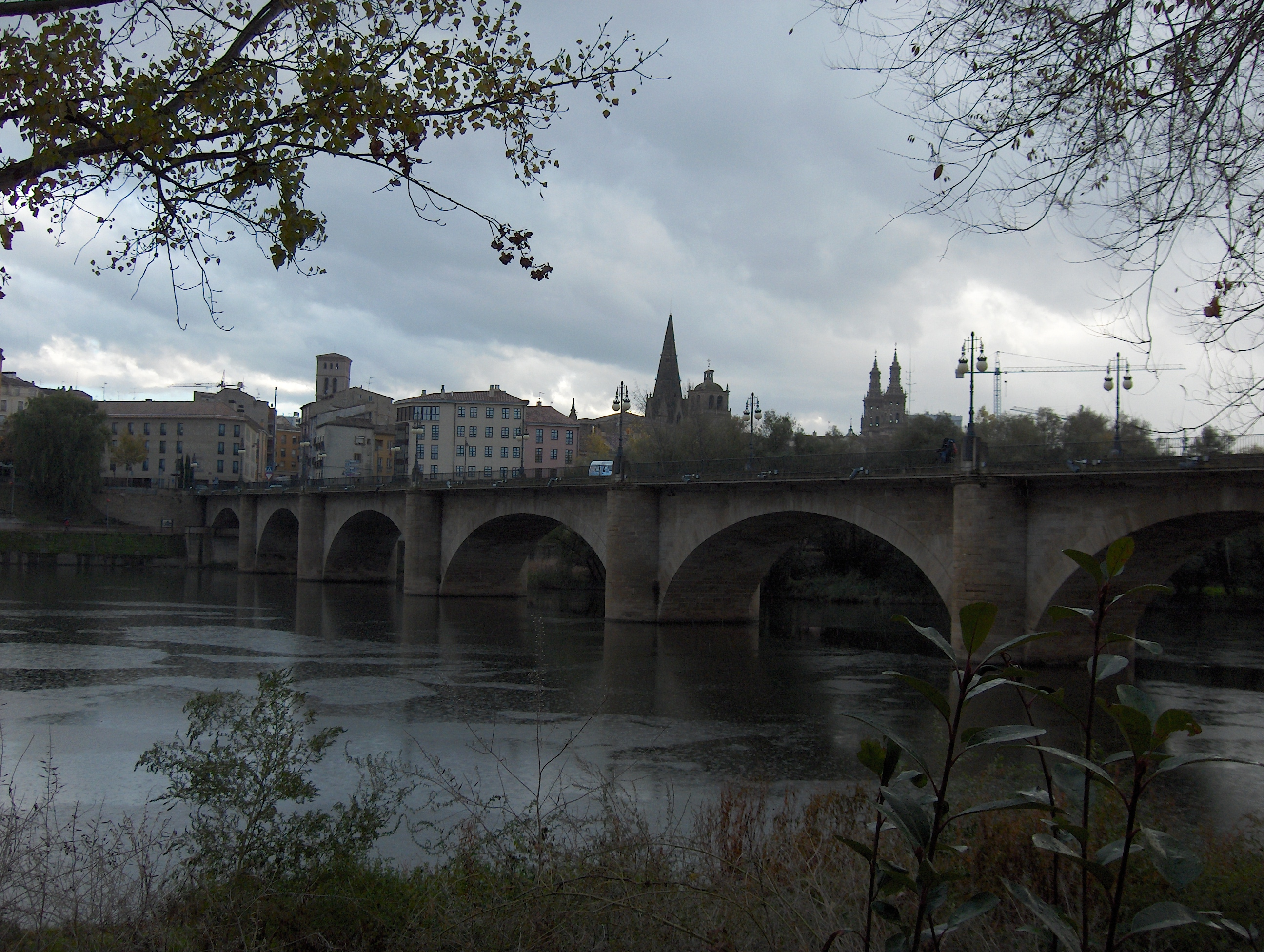 Vista puente de piedra desde el pozo cubillas